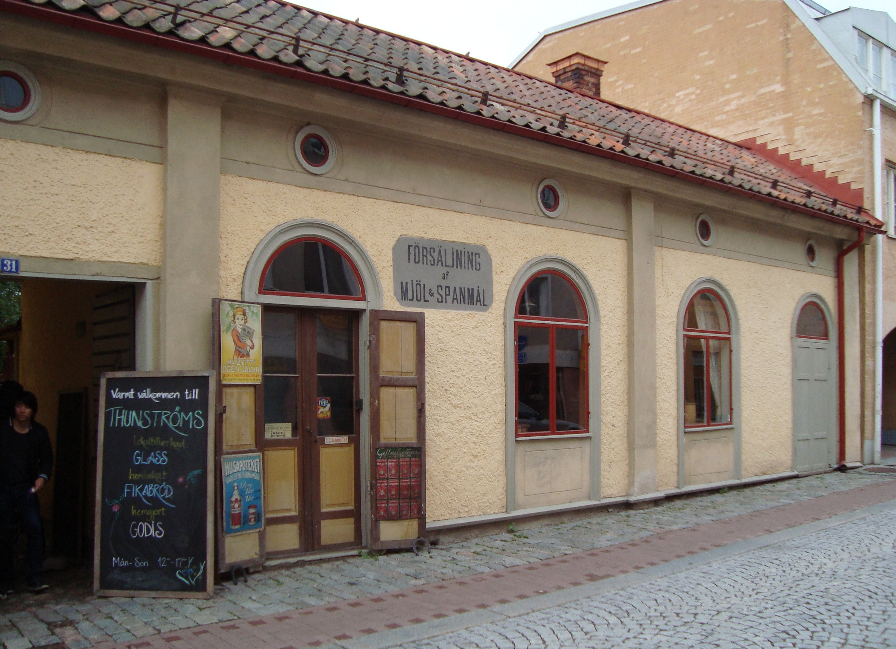 Thunströms köpmansgård, Falun, Sverige